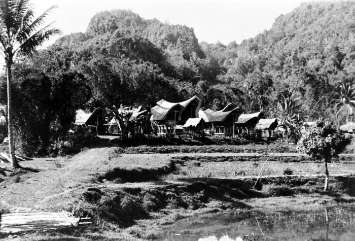 Repronegatief. Gezicht op Tondon